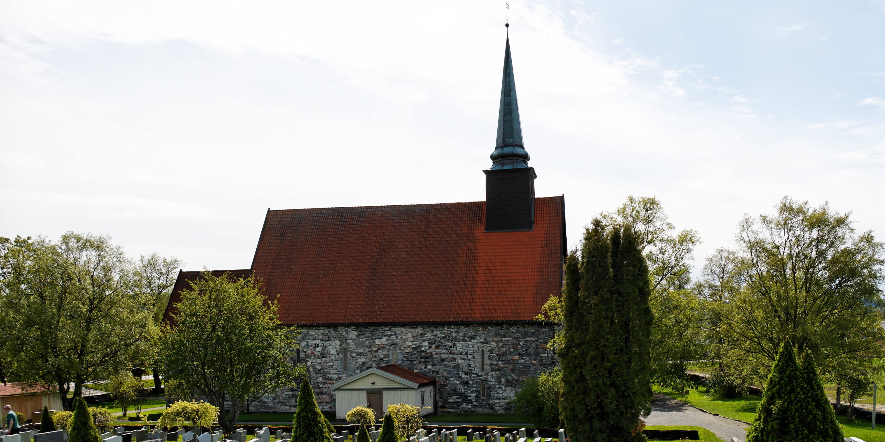 Stiklestad kirke